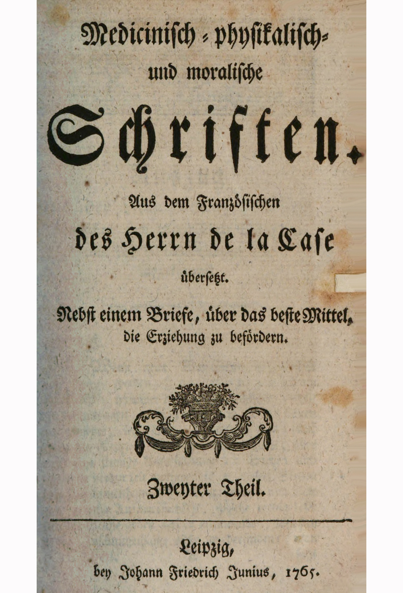 Titelblatt